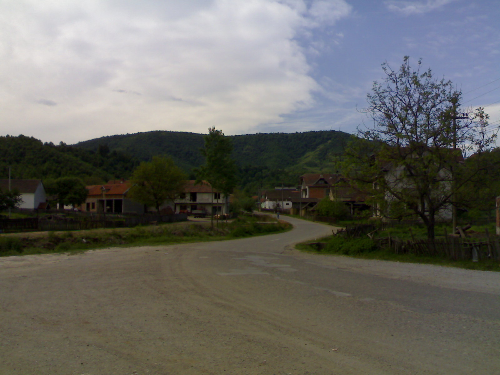 Село Бела Река-Шабац, сликано 7. 5. 2012. Licensing